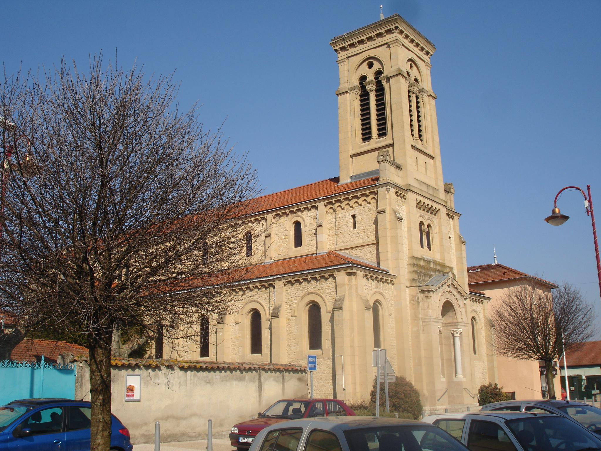 Heyrieux (38) : L'église vue générale